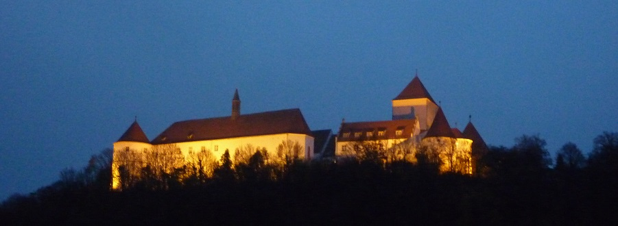 Schloss Wörth Donau bei Nacht